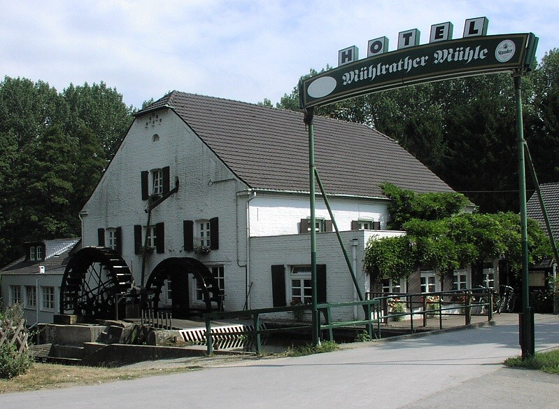 Die Mühlrather Mühle in Schwalmtal, die älteste Wassermühle am Niederrhein anno 1447. (fotografiert am 25.08.2003)